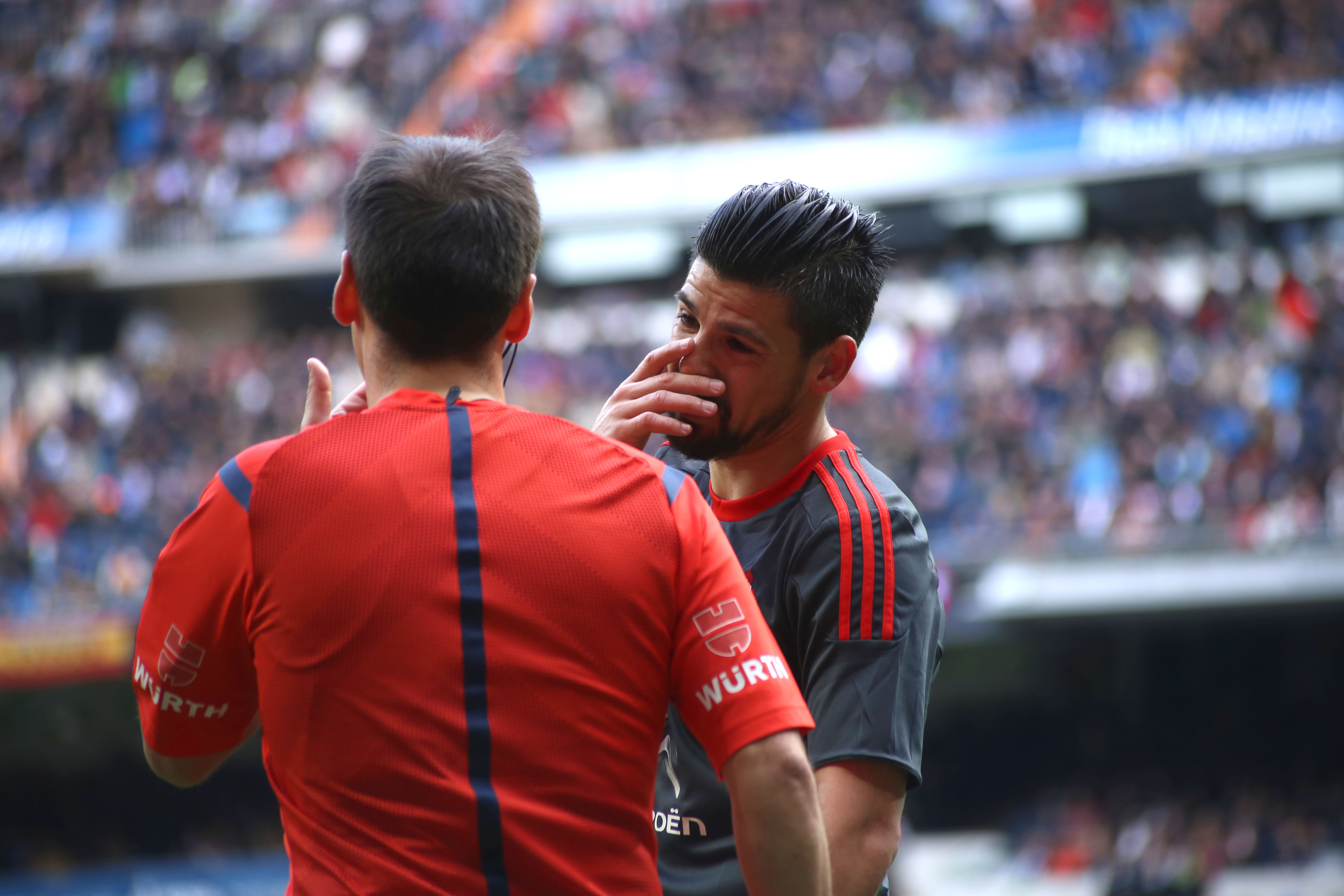 Nolito